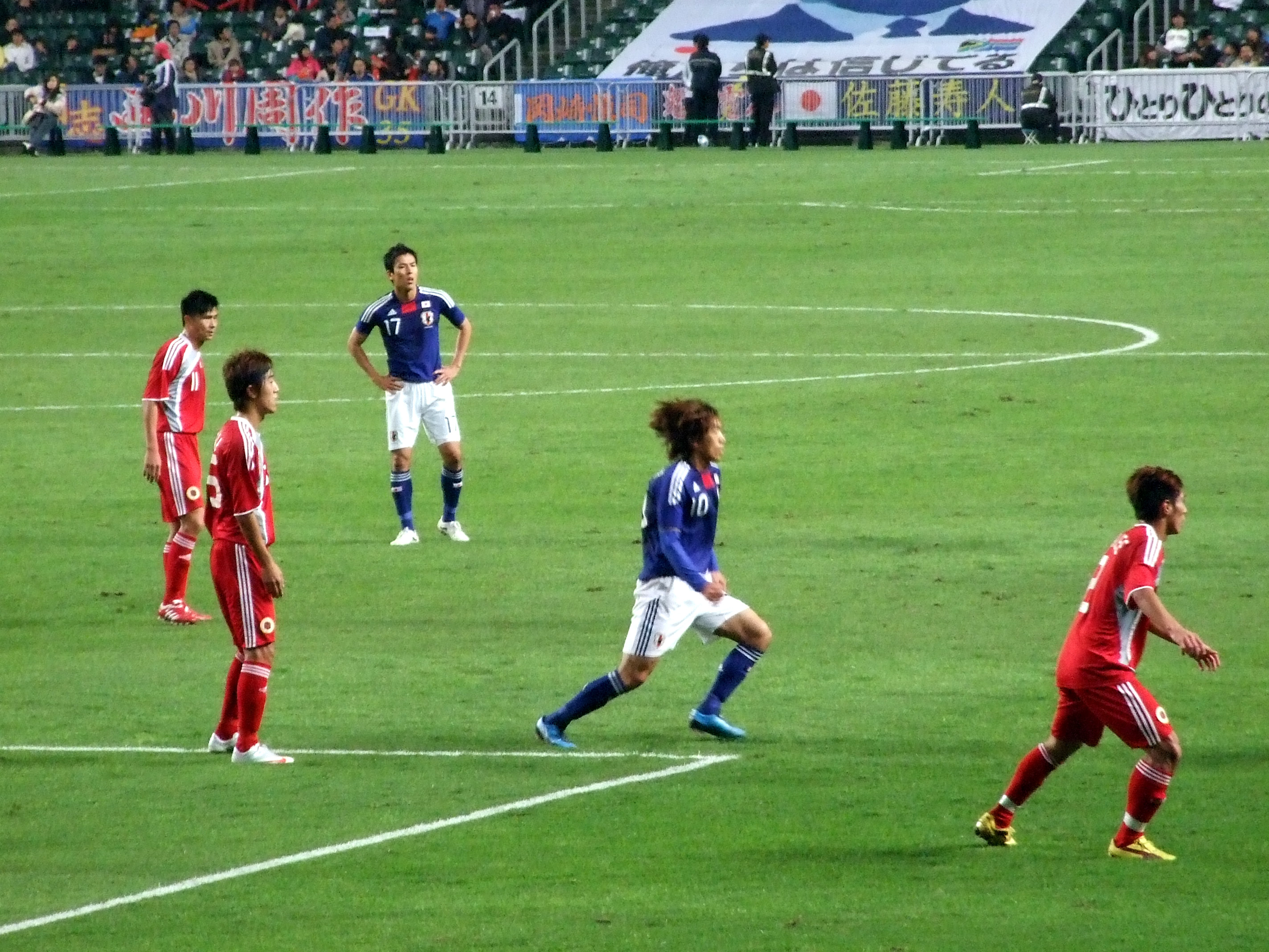 中文（香港）: 中村俊輔